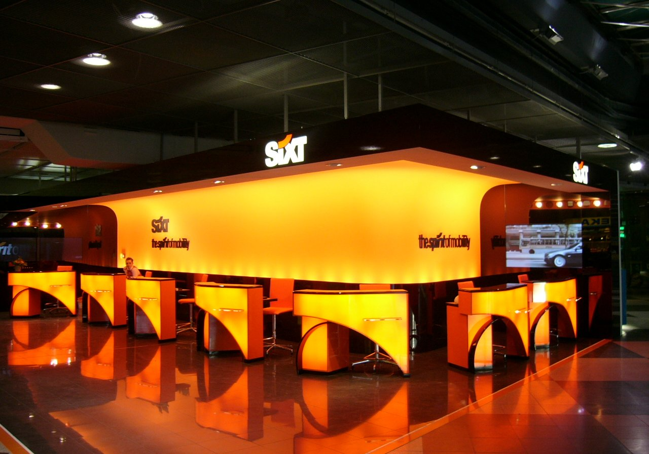 Filiale der Sixt AG des Flughafens München FJS am Übergang vom Zentralgebäude zum Terminal 2